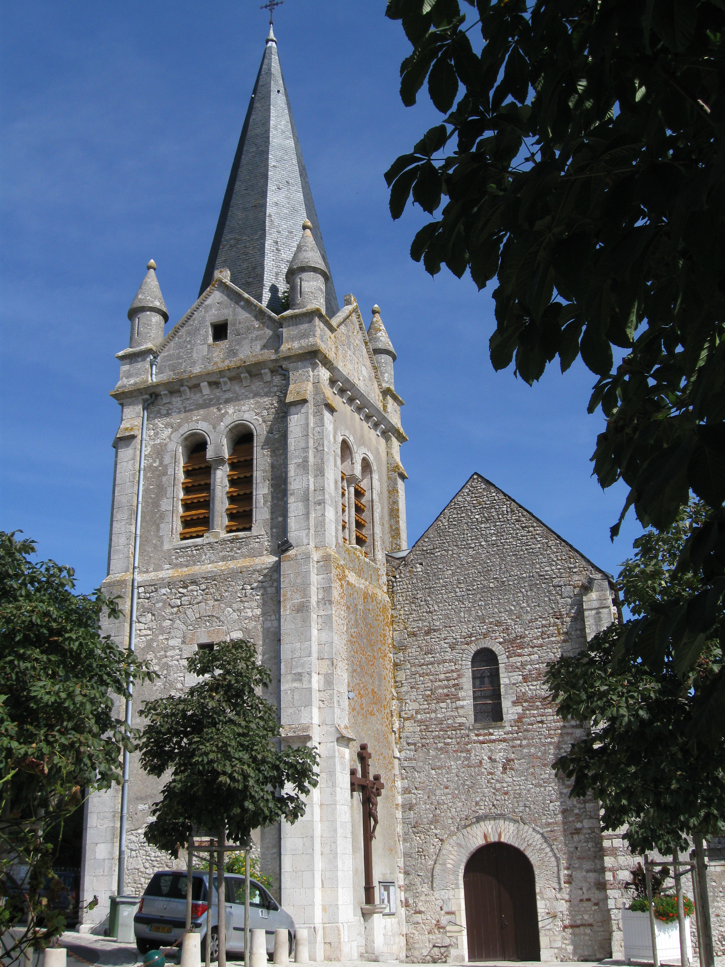 Église Saint-Mesmin, La Chapelle-Saint-Mesmin, Loiret, France